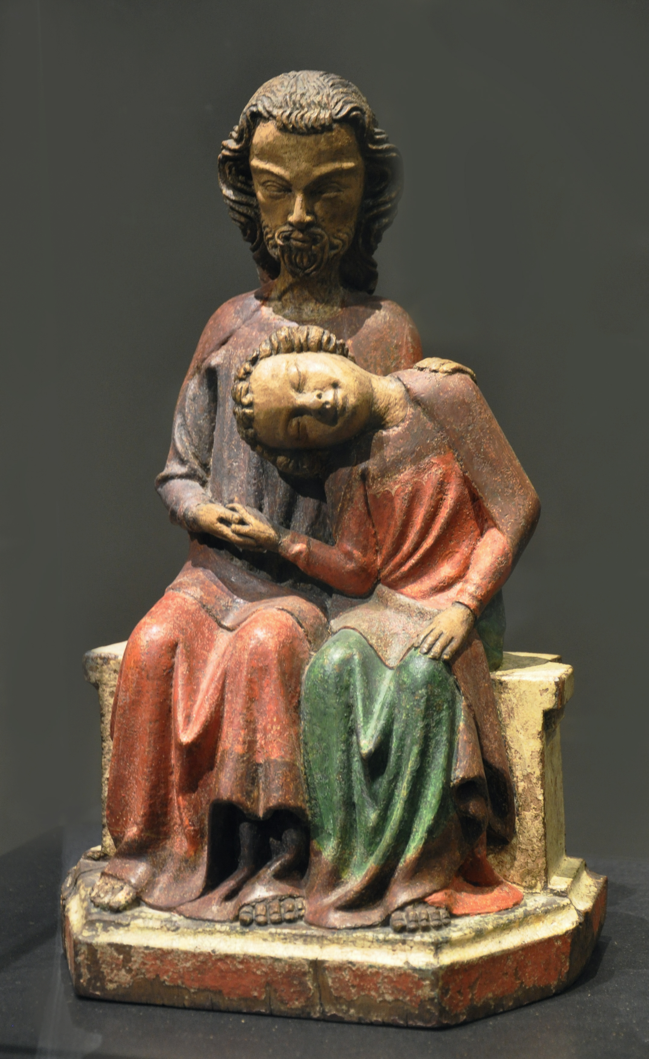 Johannesminne (Christus-Johannes-Gruppe), Oberrhein oder Bodensee, um 1350; Walnussholz, alte Farbfasssung, übergangen, Inkarnate fehlen; 34.5 cm Liebieghaus, Frankfurt am Main, Inv. Nr. 1447 (aus Kloser Adelhausen in Freiburg im Breisgau)